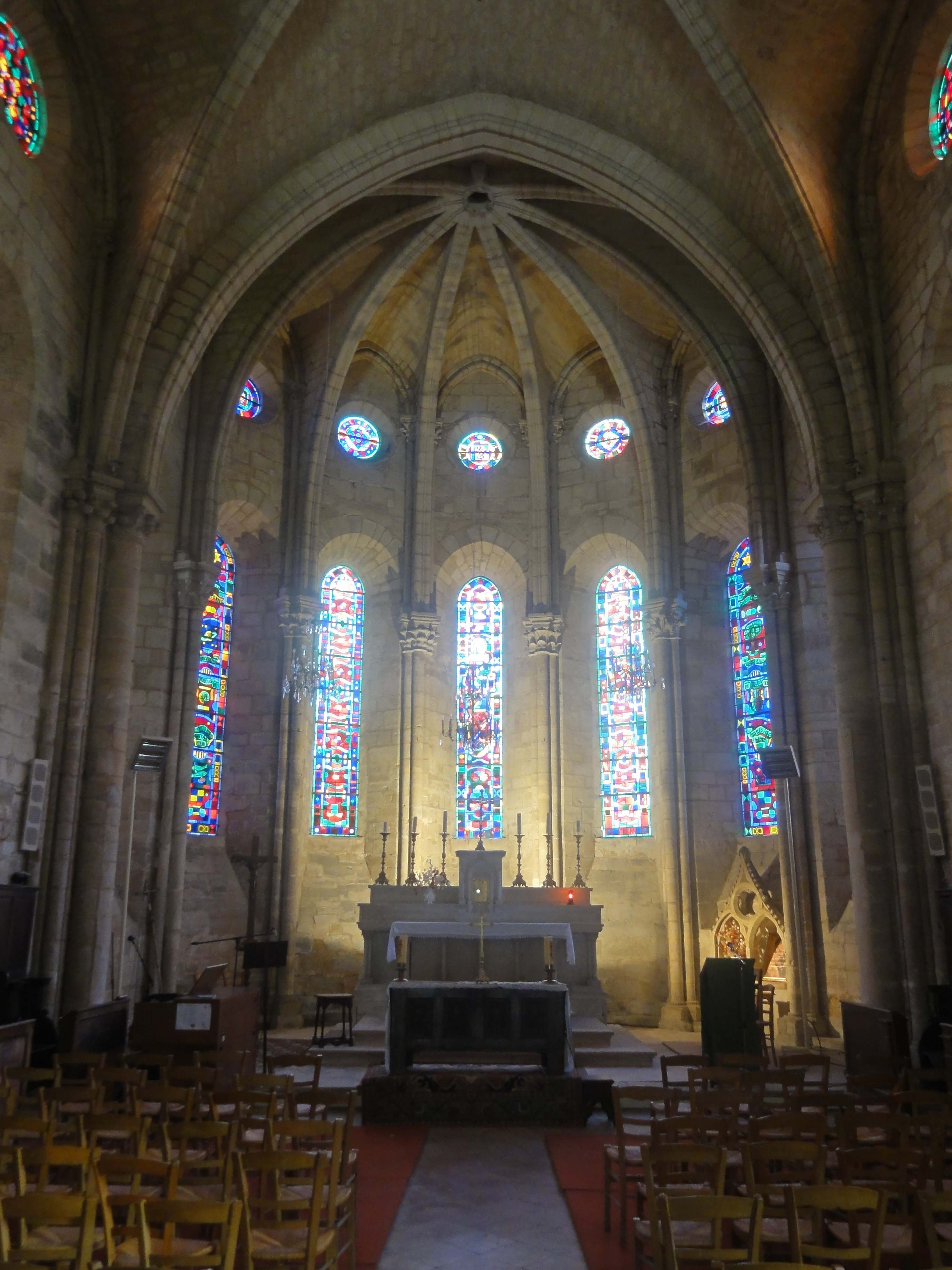 Chœur, vue vers l'est.